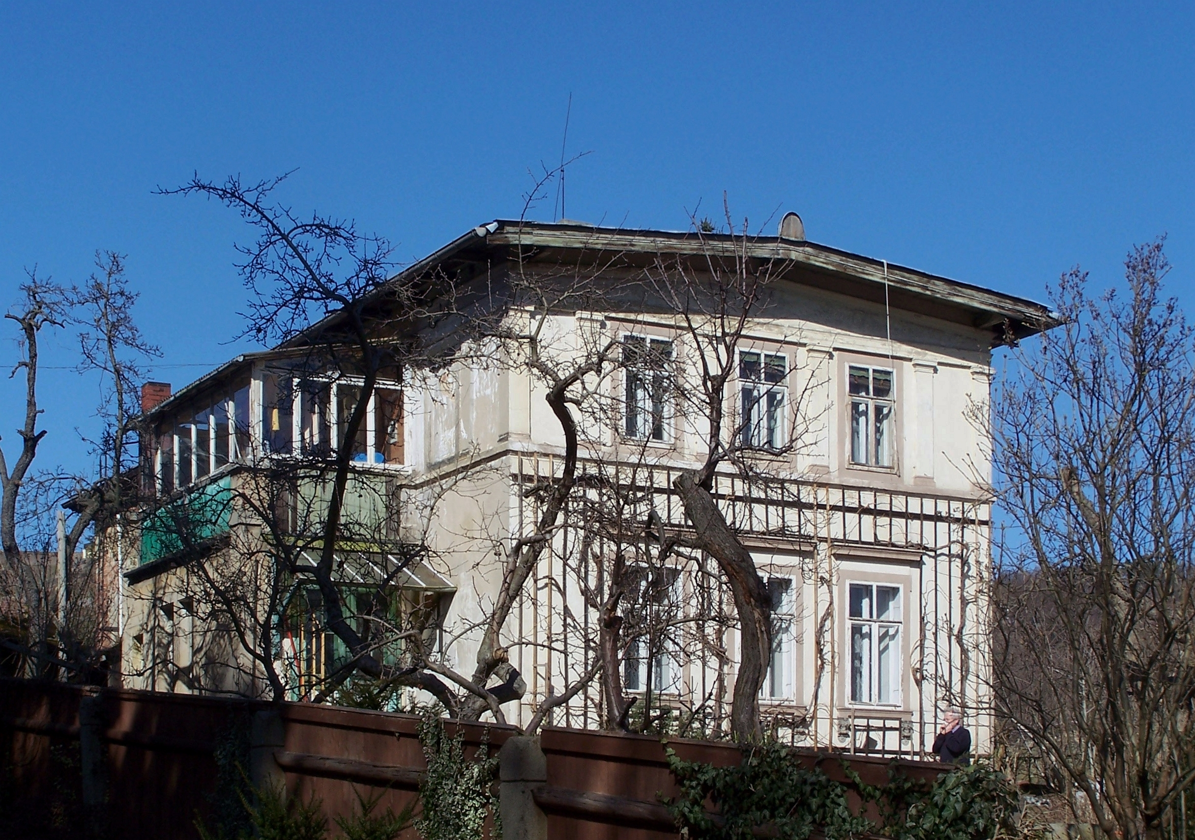 Villa Nizzastr. 9 in Radebeul